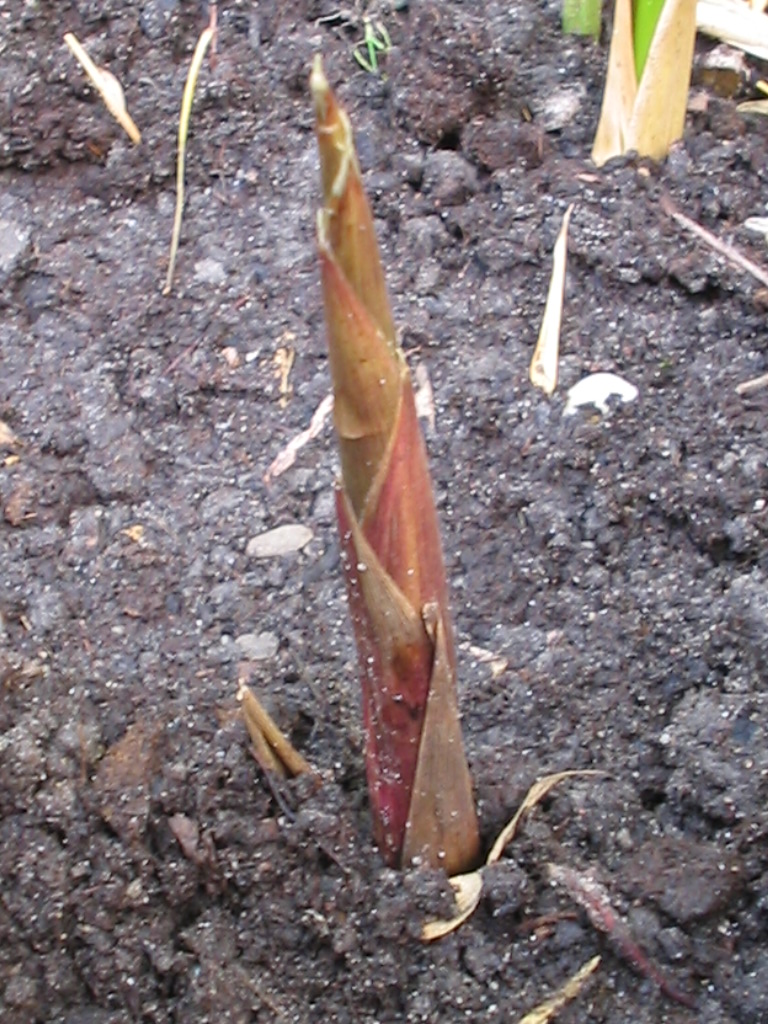 bamboescheut 8 cm, okt 2004